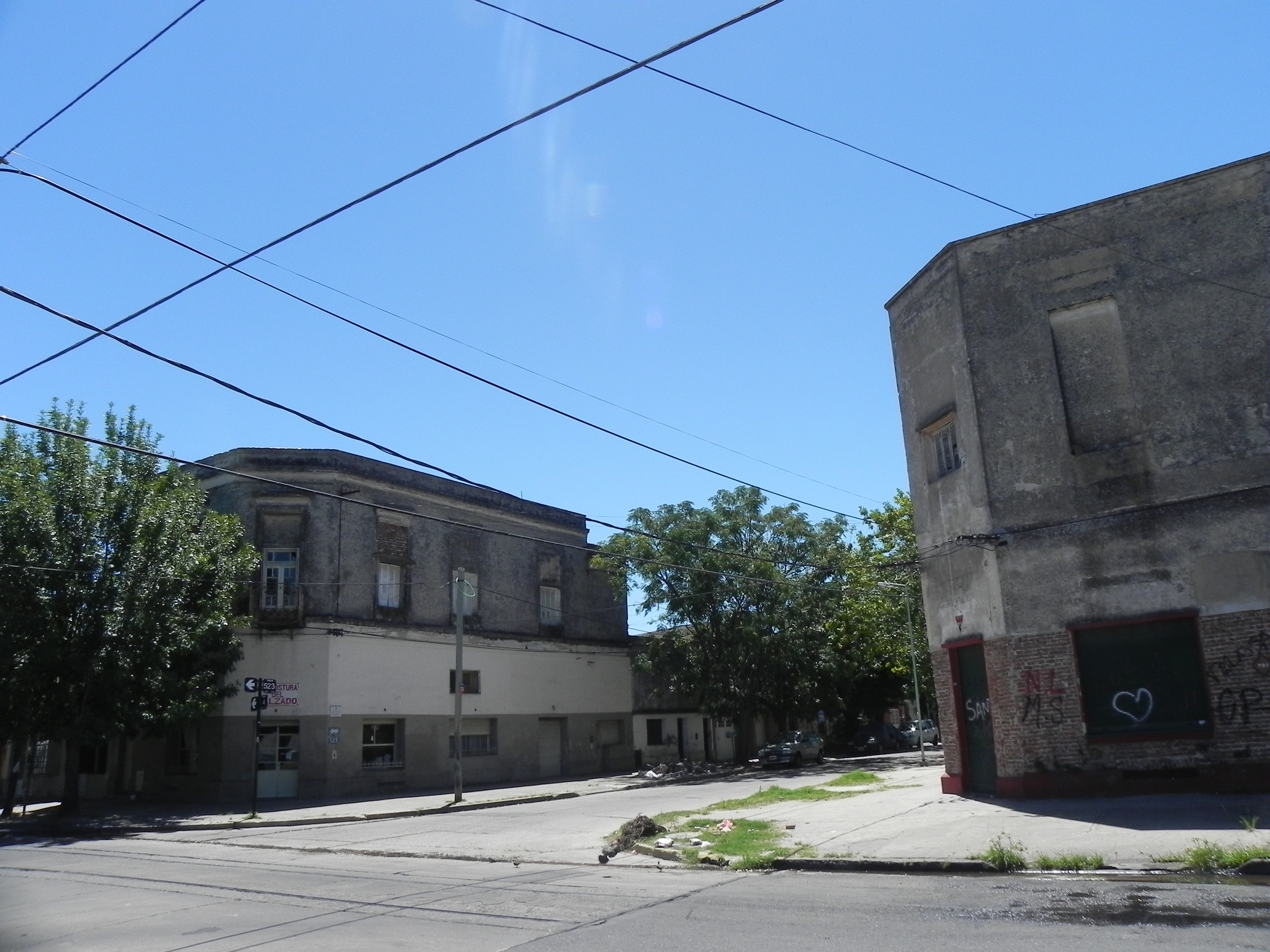 Esquina del barrio Mil Casas, Tolosa, Buenos Aires, Argentina en la actualidad